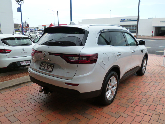 ルノーコレオス